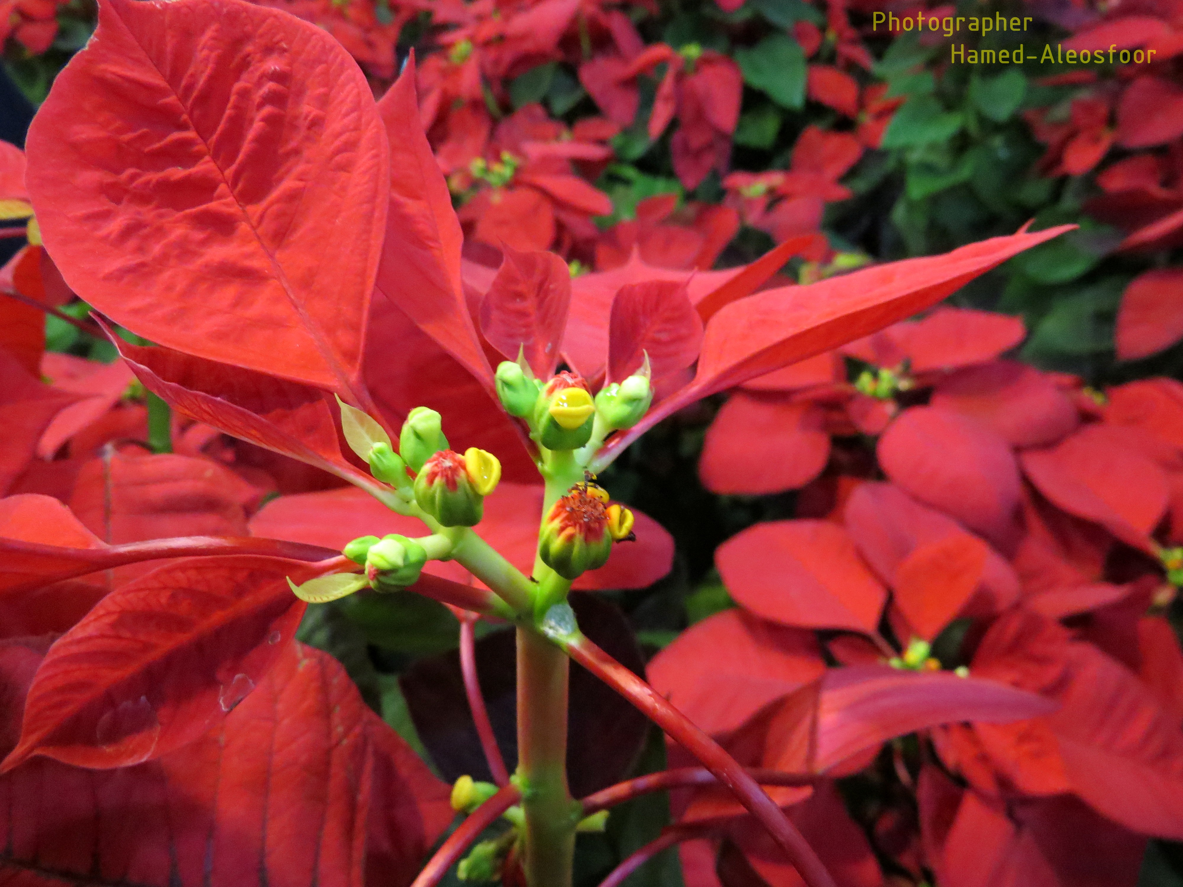 در زمان‌های بسیار کهن در مکزیک، دختری به نام پپیتا که زندگی فقیرانه‌ای داشت، در شب کریسمس، بسیار اندوهگین، به همراه پسر عمویش، در راه رفتن به کلیسا بود. او که مایل بود در این شب، هدیه‌ای قشنگ و با ارزش را به همراه خود به کلیسا و به محضر مسیح ببرد، در طول مسیر به این فکر کرد که مهم نیست هدیه‌اش چه باشد، اگر هدیه‌اش سرشار از عشق باشد، ناچیز بودن آن جلوه‌ای نخواهد کرد. با این اندیشه گل‌های هرز روییده شده در جاده را کند و با عشق فراوان به داخل ساختمان کلیسا وارد شد و آن گل‌ها را در جامی درست زیر پای تندبس مسیح گذاشت که ناگهان معجزه‌ای روی داد و تمامی این گل‌ها با انرژی عشق این دختر کوچک، به گلی سرخ رنگ، مشهور به بنت قونسول، مبدل می‌شوند.